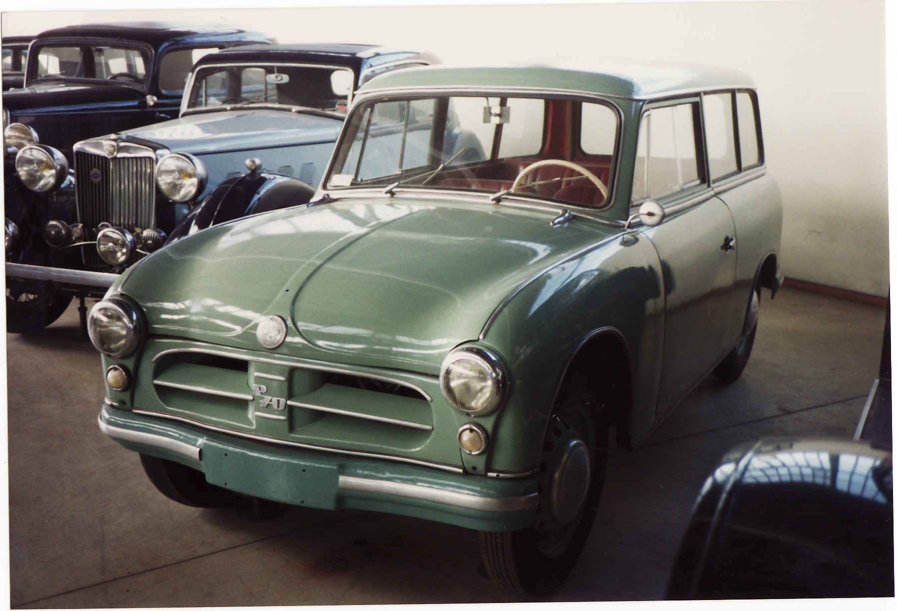 AWZ P70 "Zwickau" Kombi c.1955-59